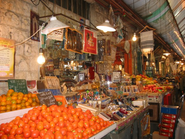 mahne yehuda market in jerusalem. taken by גילה ברנד